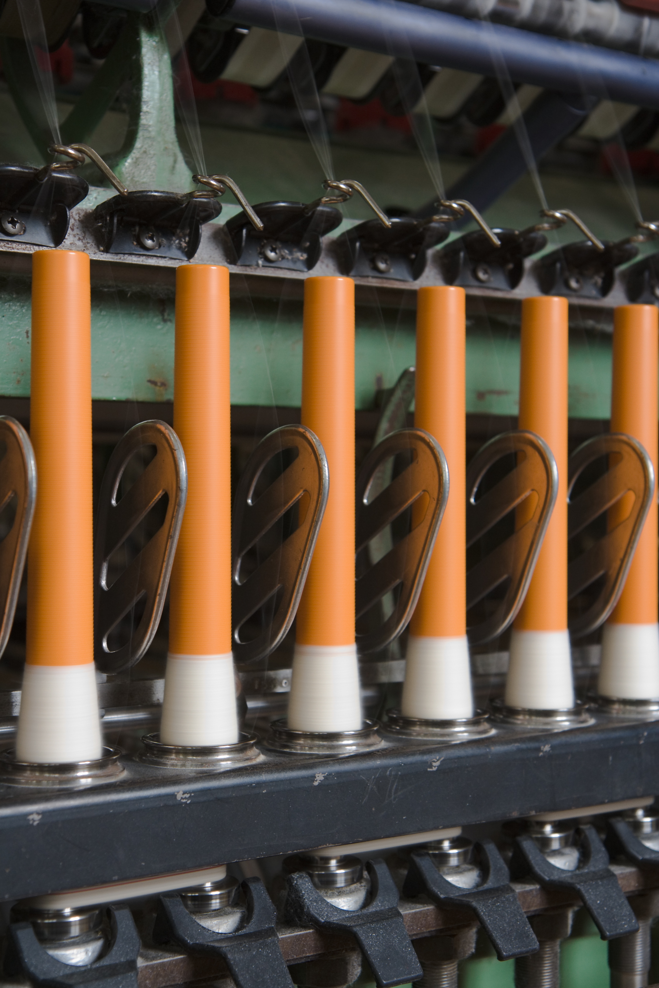 Kopse mit Baumwollgarn auf einer Ringspinnmaschine